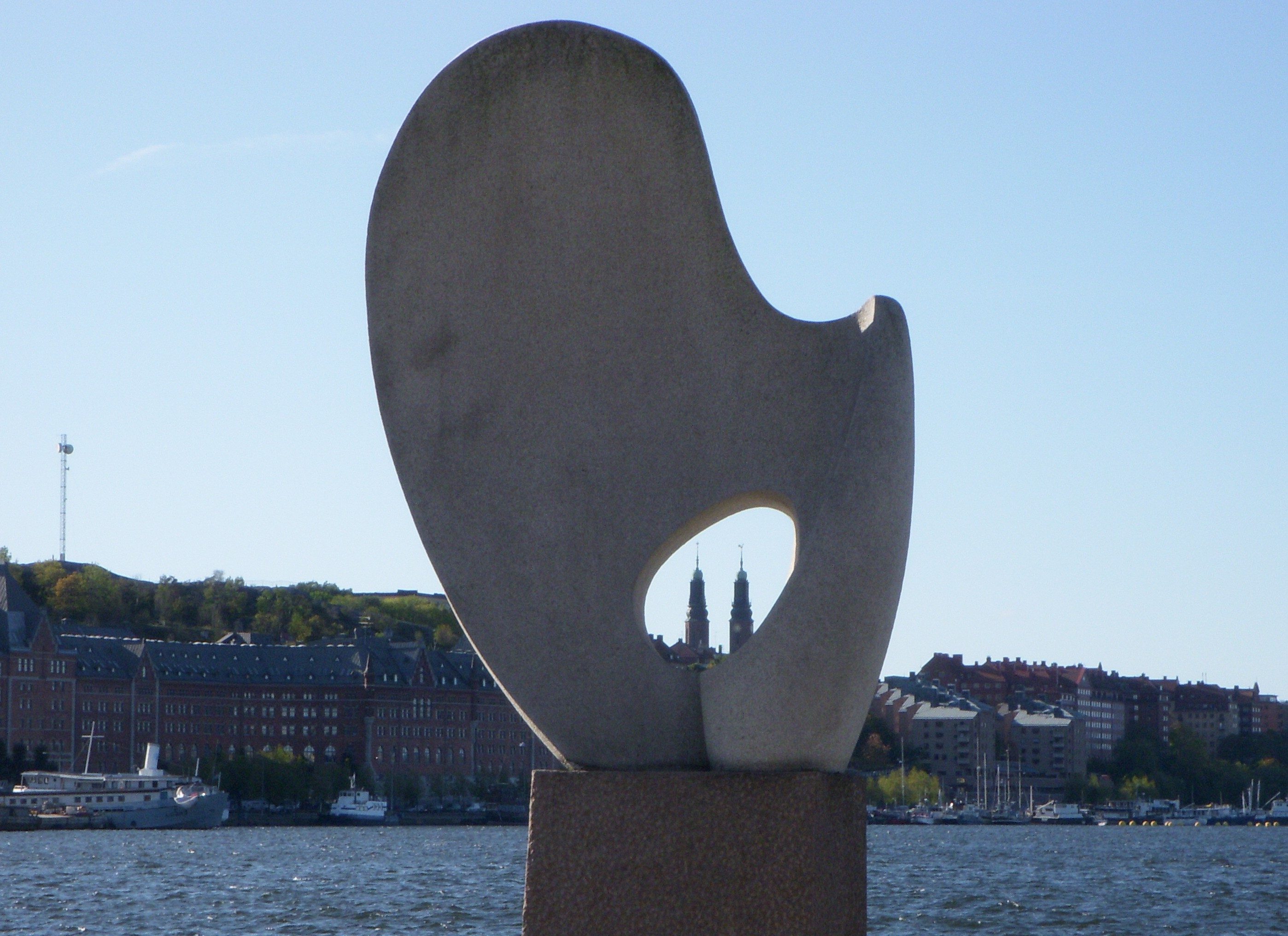 Skulptur "Solbåten" på Riddarholmen av Christian Berg med Högalidkyrkan